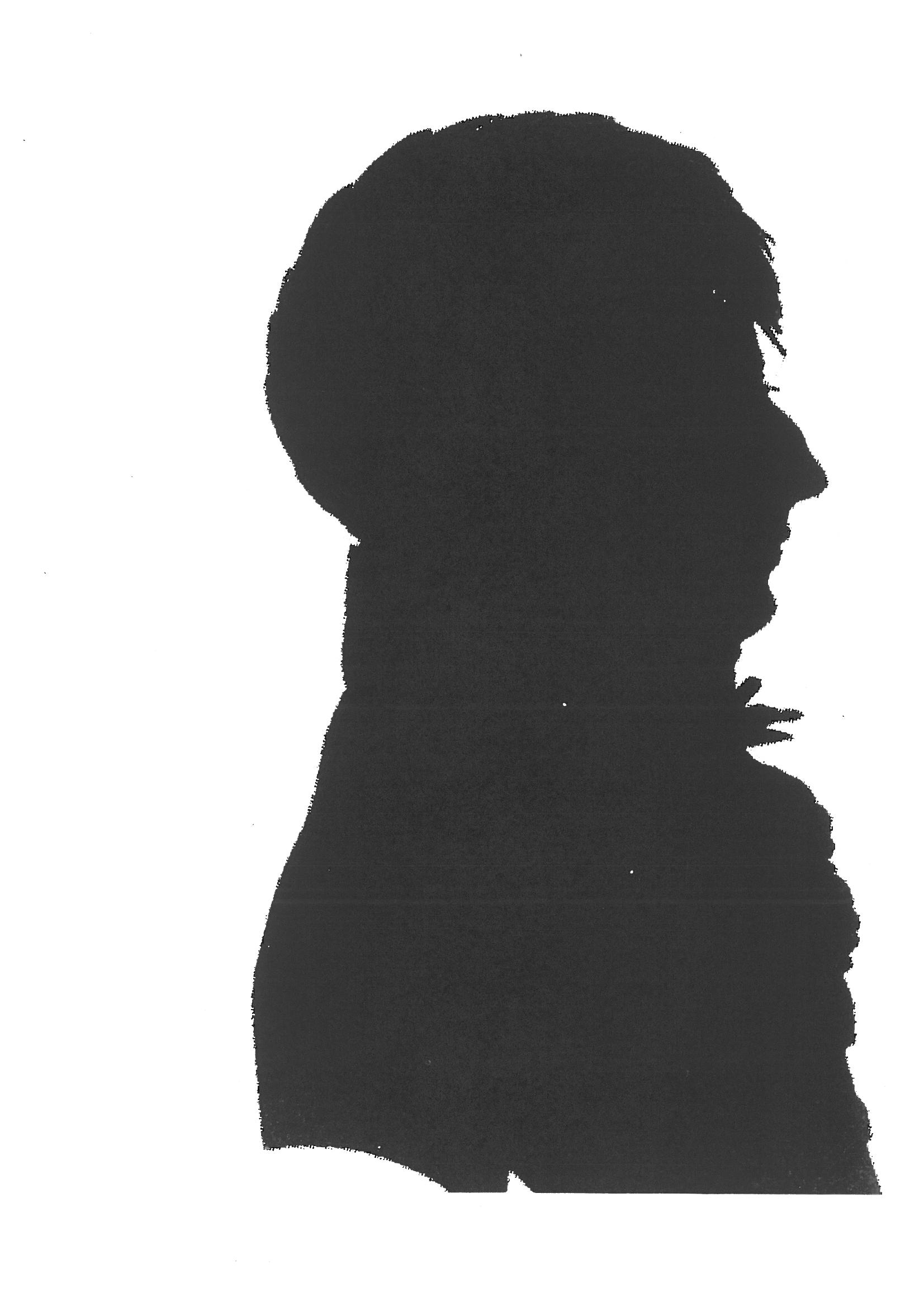 Schattenriss des Heinrich Wilhelm Hayen (1791-1854) als Student der Rechte in Heidelberg 1810